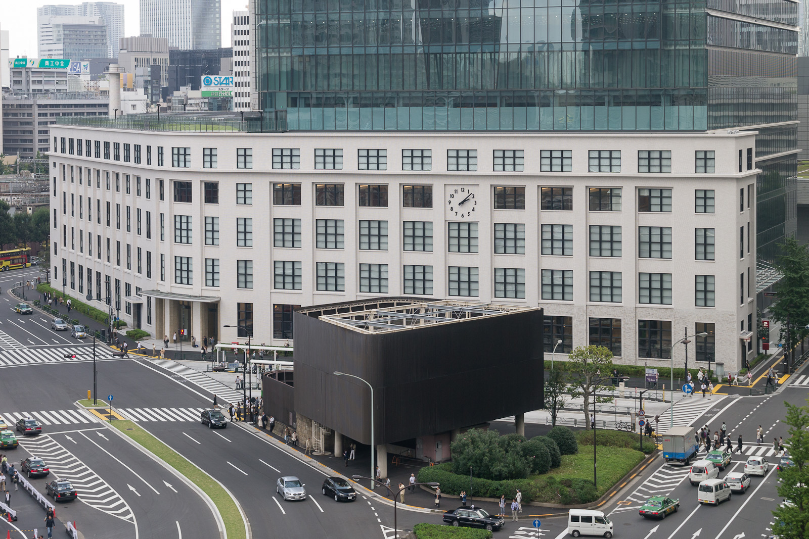 JPタワー、東京都千代田区丸の内2丁目。